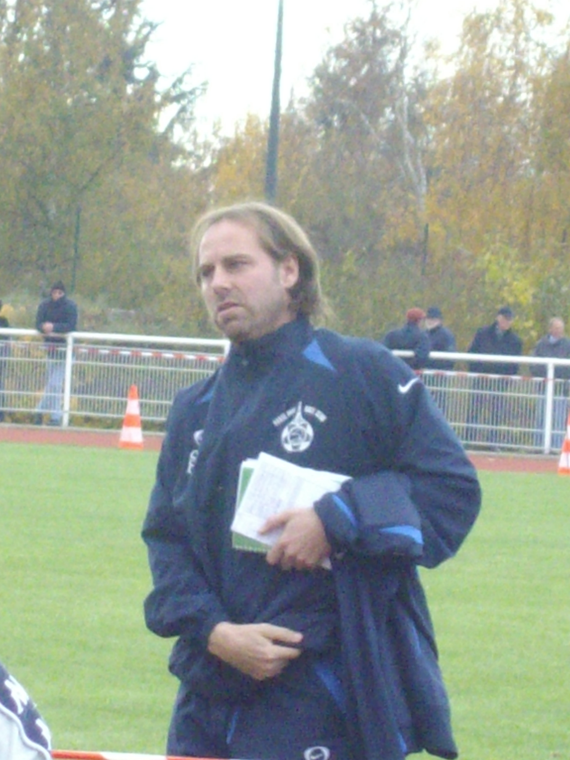 Jean-Guy Wallemme lorsqu'il entraînait le Paris Football Club à l'occasion du match Guyancourt-Paris FC en Coupe de France de football.